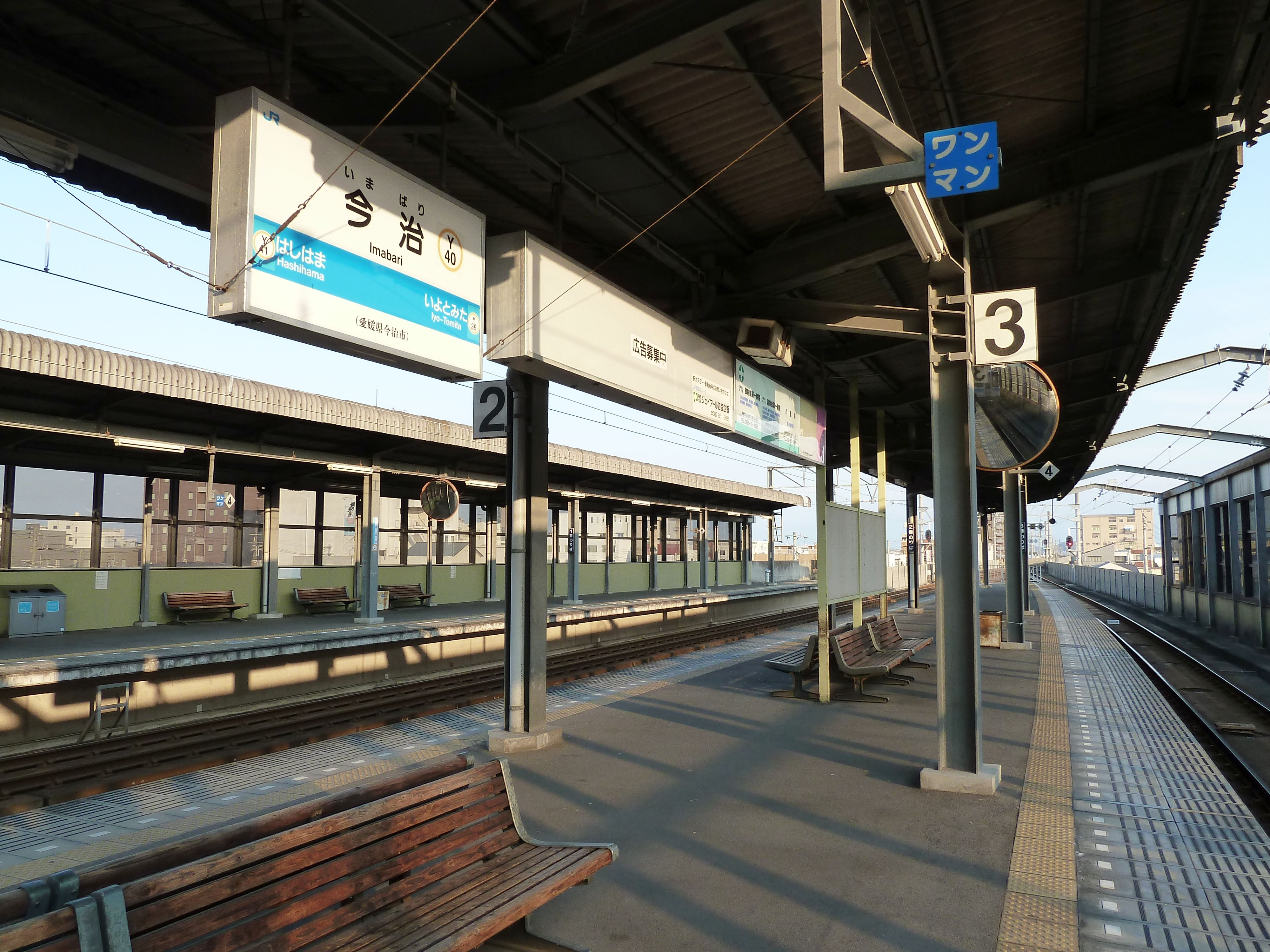 今治駅構内